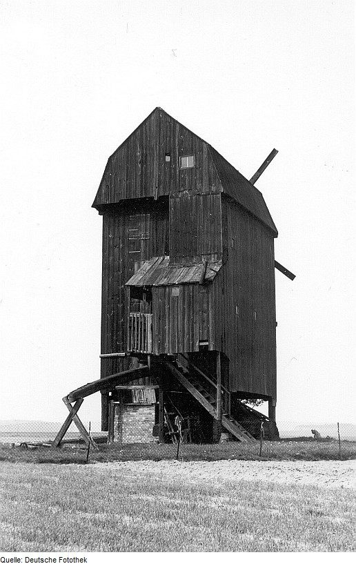 Original image description from the Deutsche Fotothek Jessen (Elster)-Klossa. Bockmühle